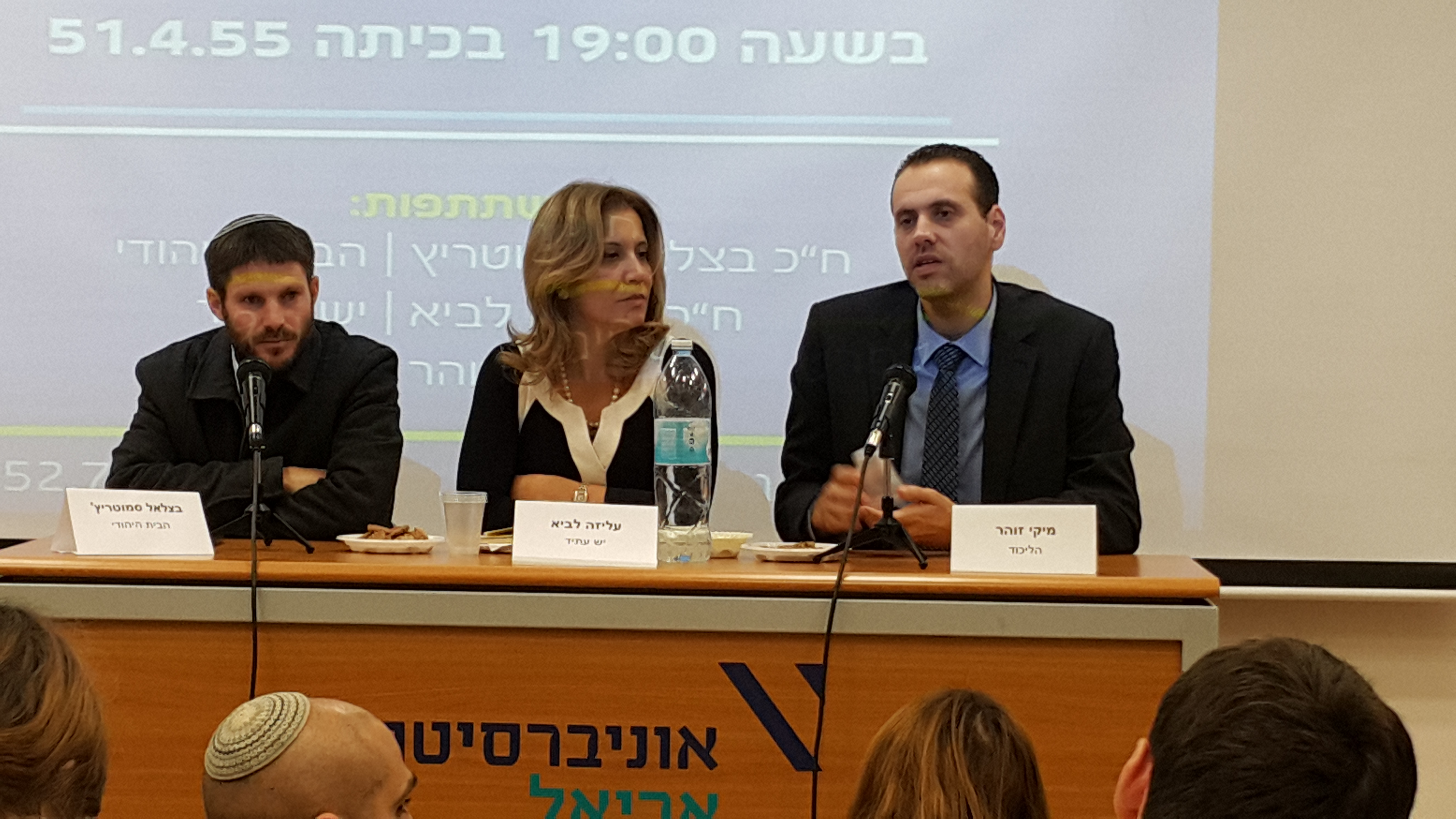 Bezalel Smotrich, Aliza Lavie et Miki Zohar (de gauche à droite)